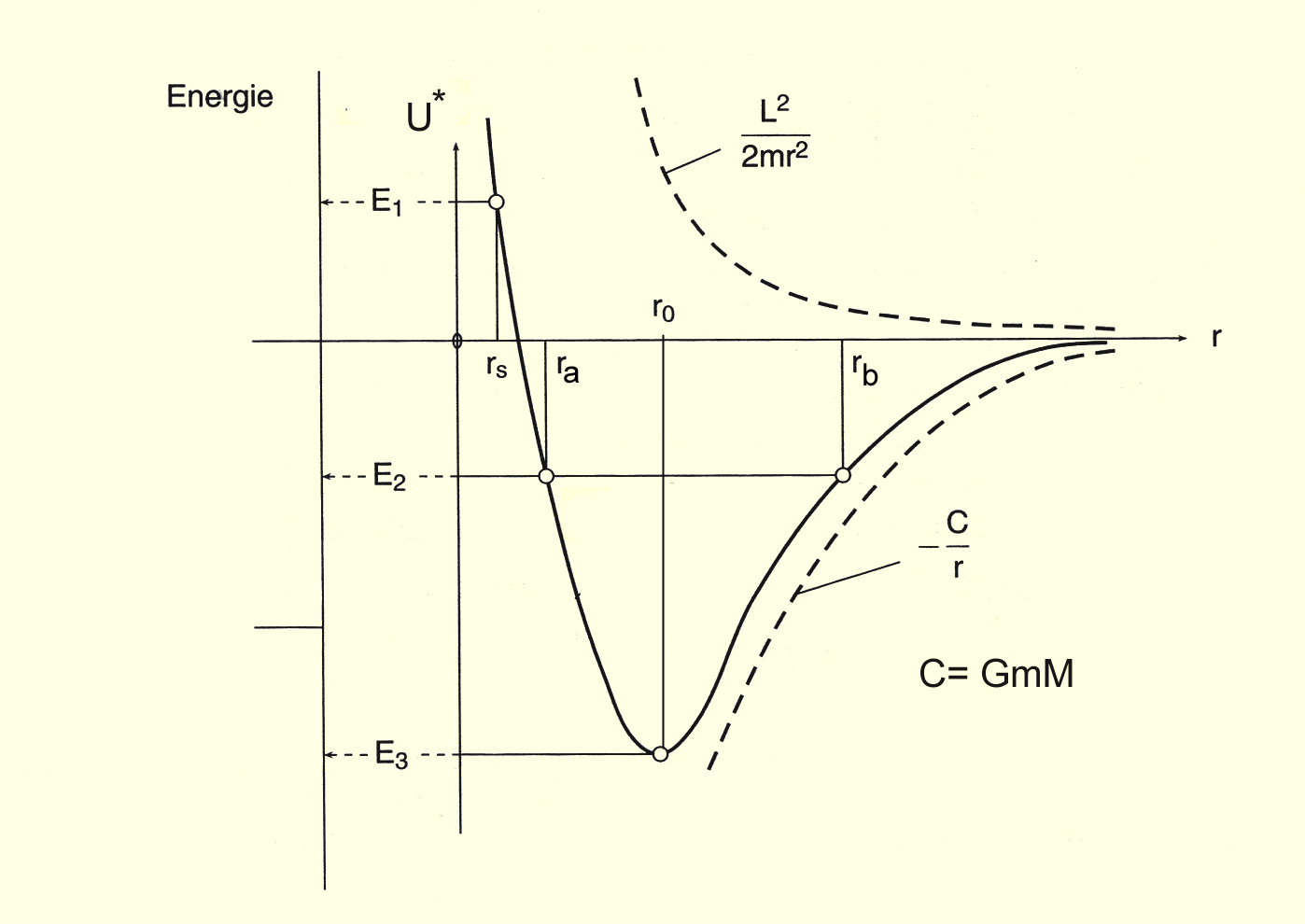 Effect.potenzial.